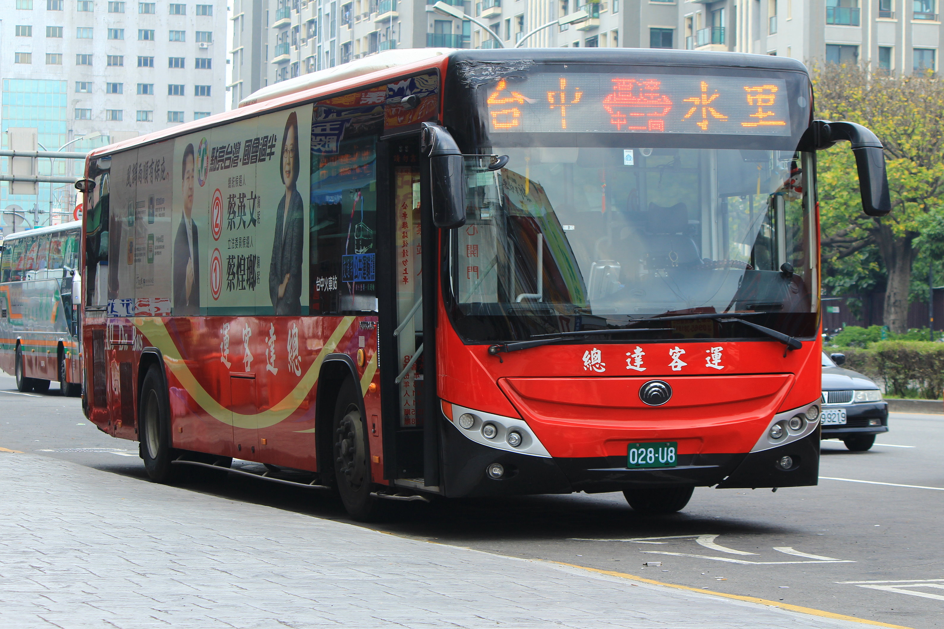 干城待發中~